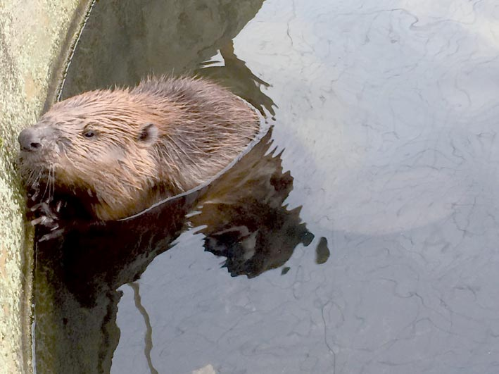 Europar kastorearen ale bat, Kanpezuko (Araba) arrain haztegian harrapatuta, 2016ko urriaren 25ean. Gizakiek lagunduta, errekara itzuliko zen gero.